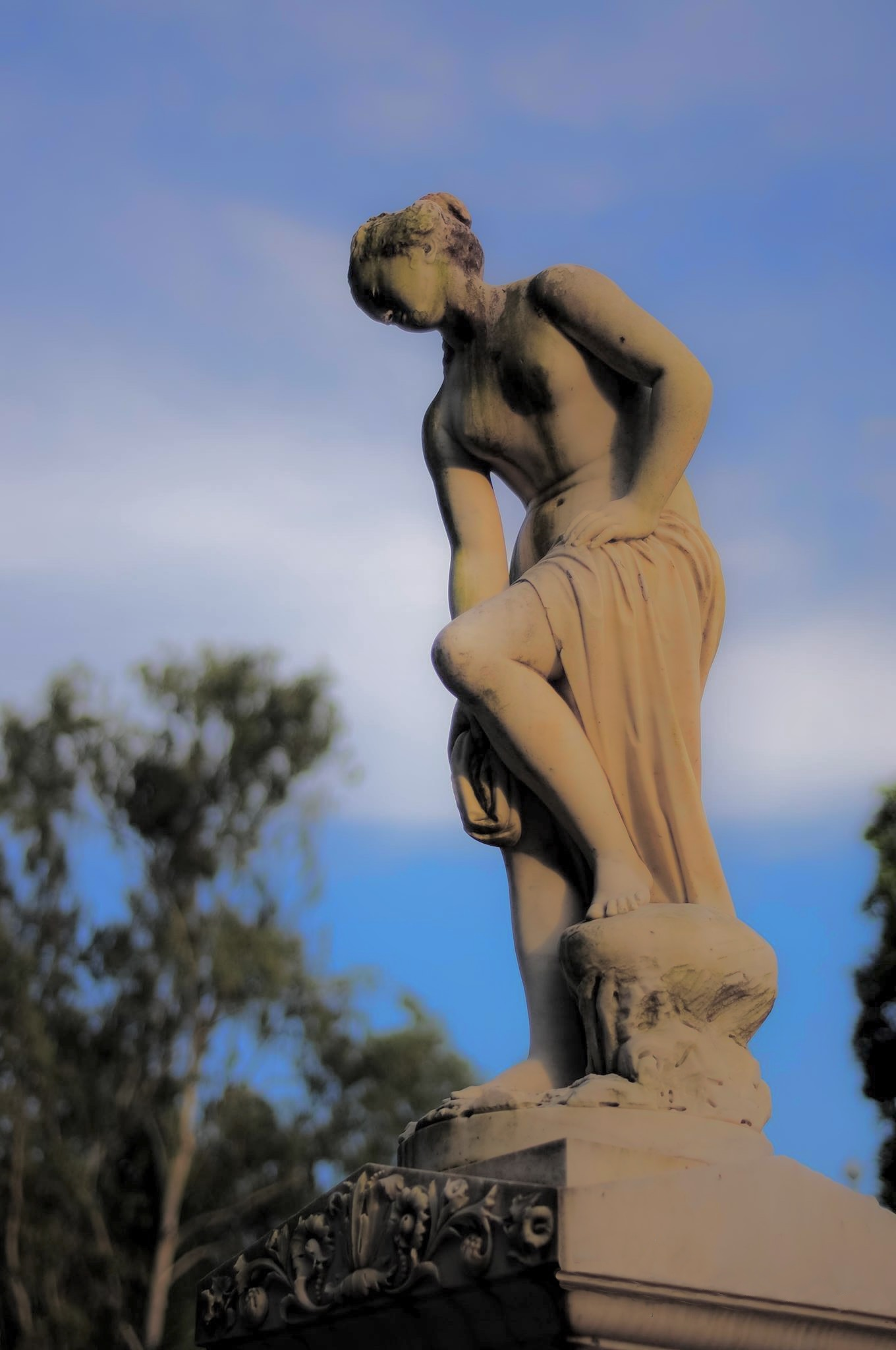 শশী লজ